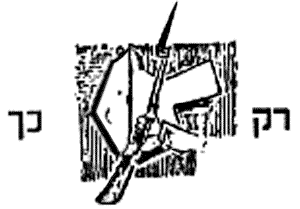 Irgun emblem